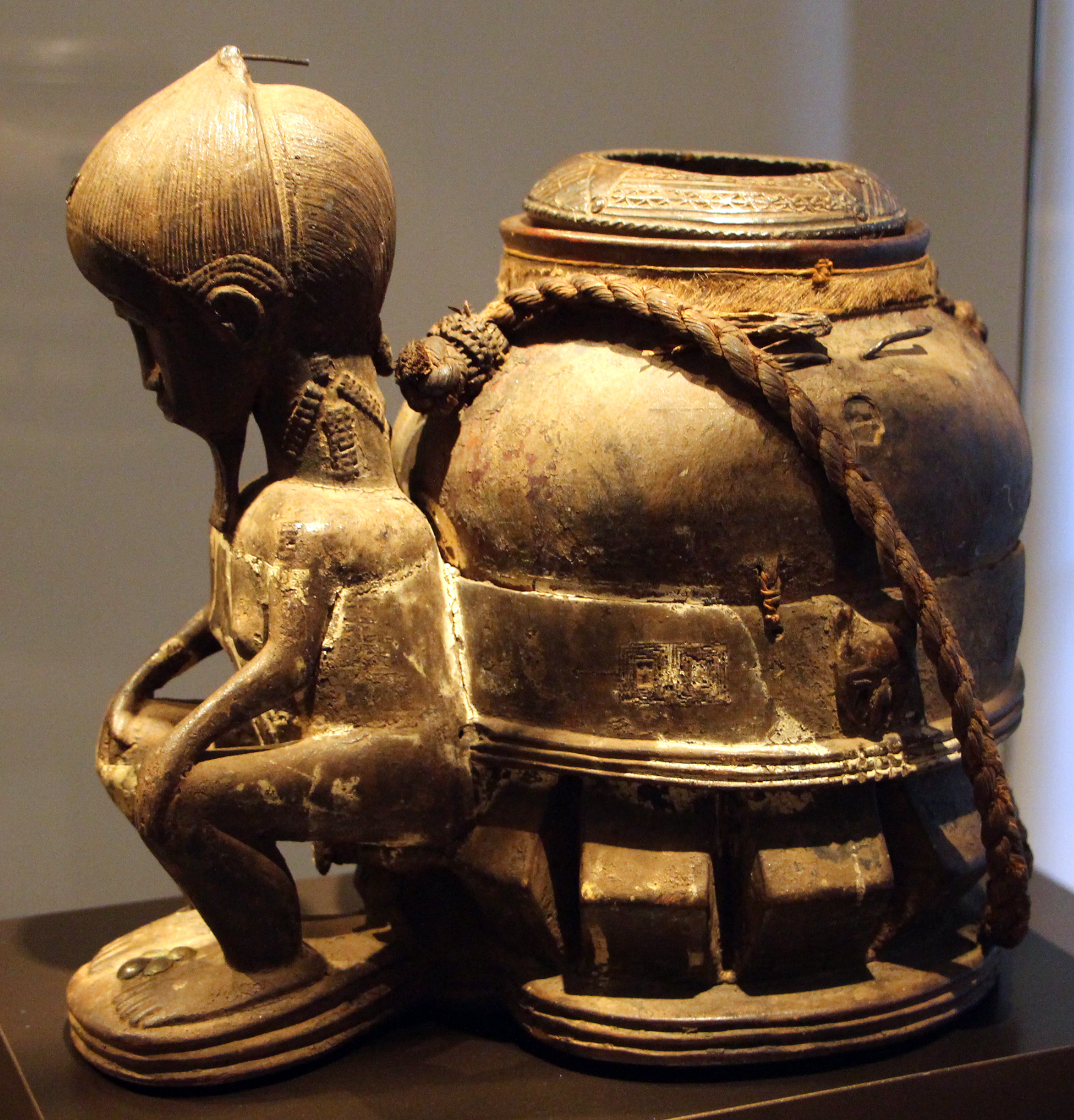 Arts of Africa in the Louvre - Room 1